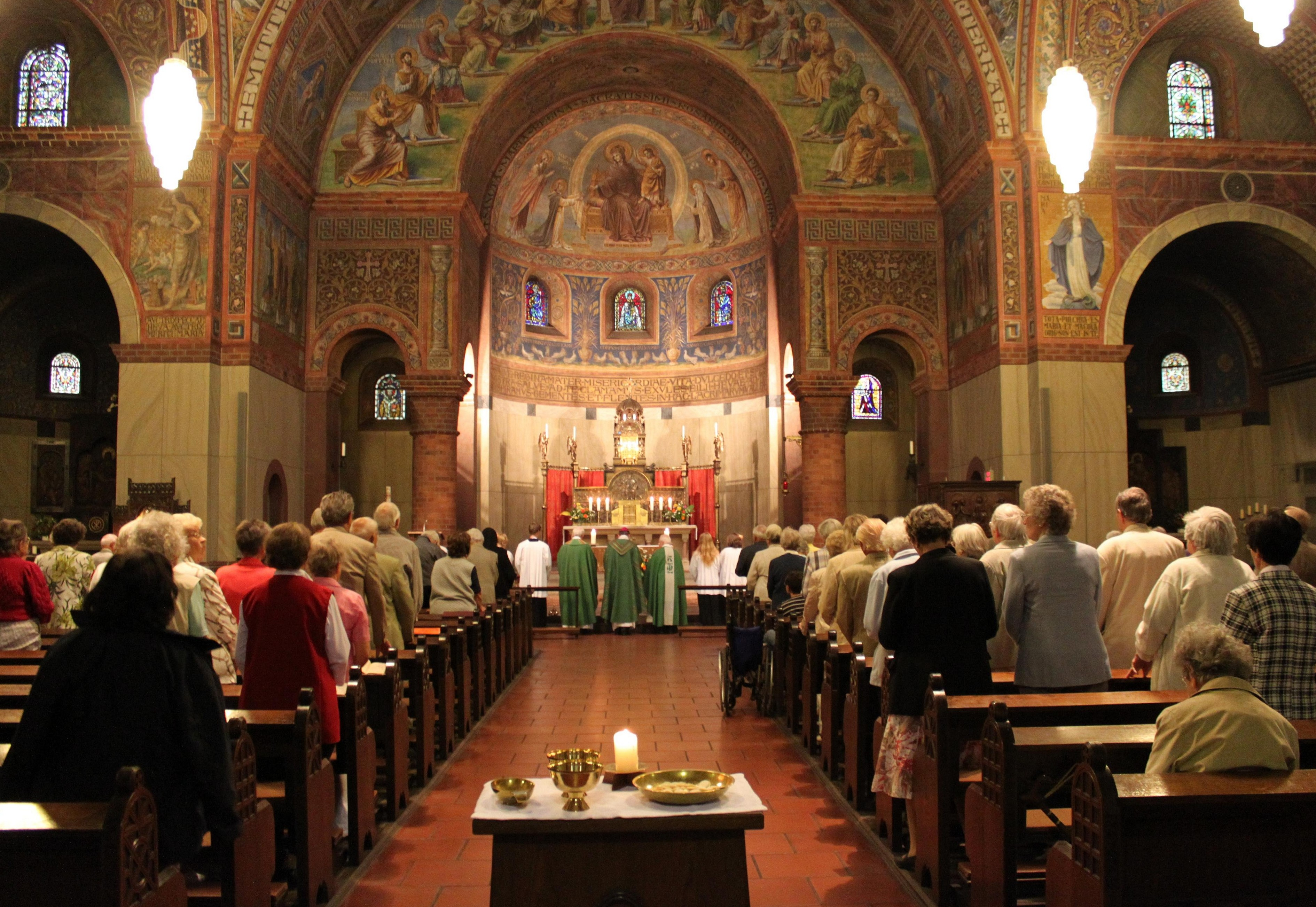 Berlin, Rosenkranz-Basilika, Inneres während der hl. Messe